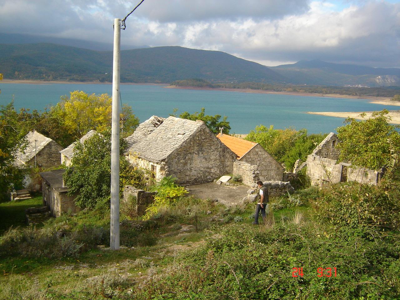 21236, Garjak, Croatia